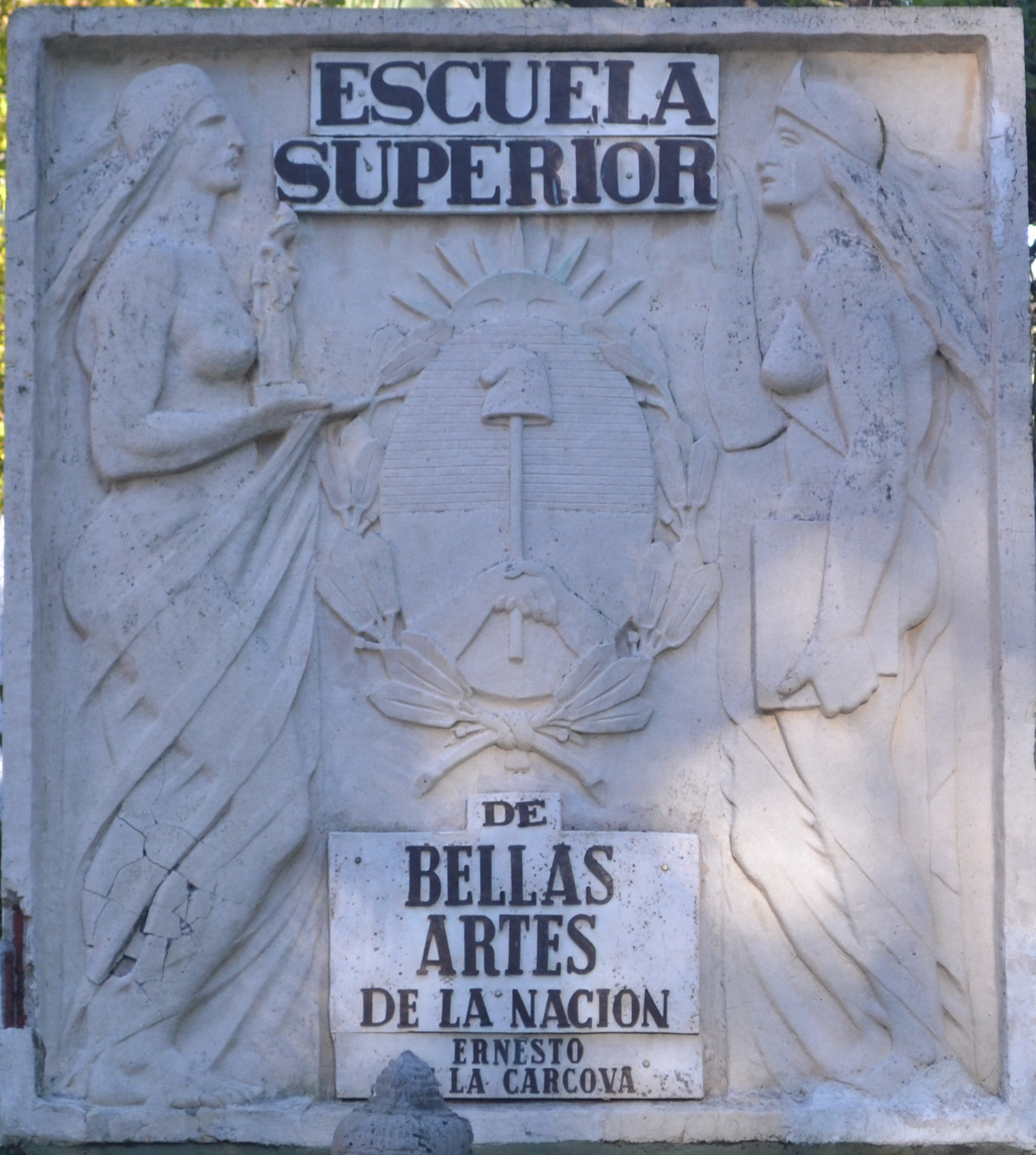 Escuela Superior de Bellas Artes Ernesto De La Cárcova